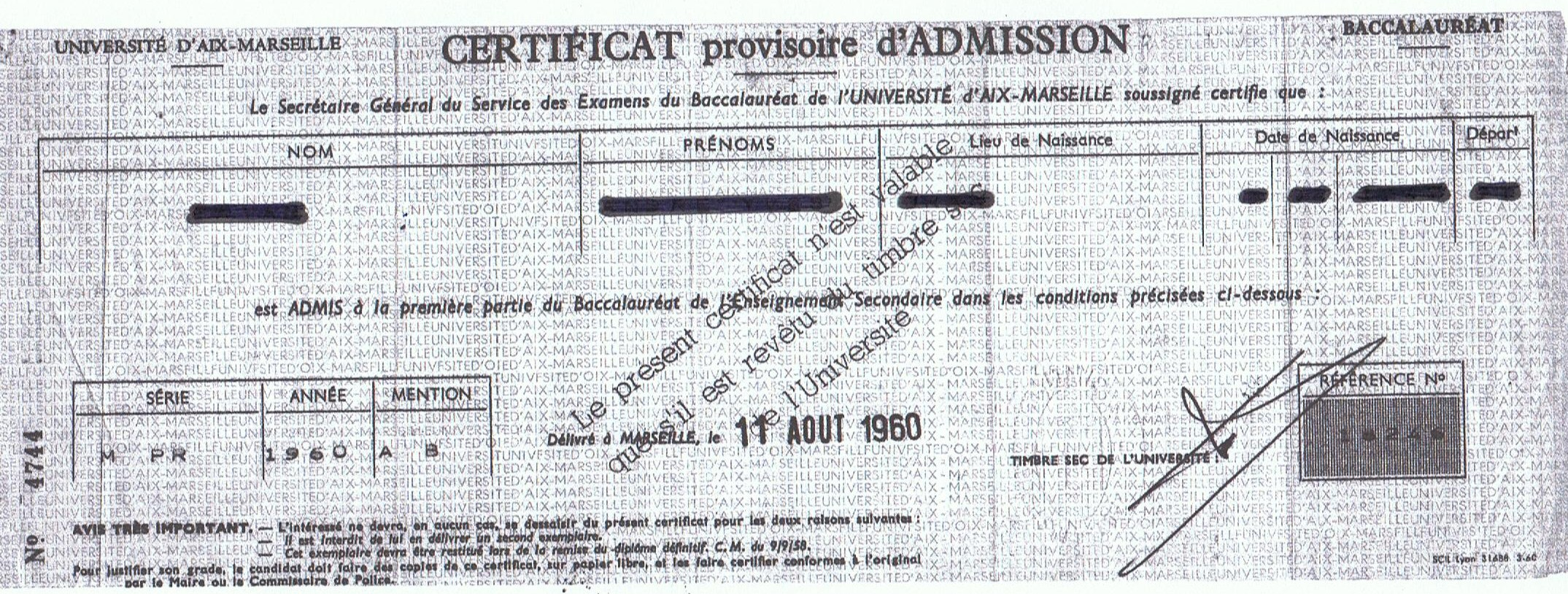 Certificat d'admission à la première partie du baccalauréat Moderne prime (M') obtenu au cours de l'année scolaire 1959-1960 en classe de première Moderne prime c'est à dire en deuxième année d'Ecole normale d'Avignon.